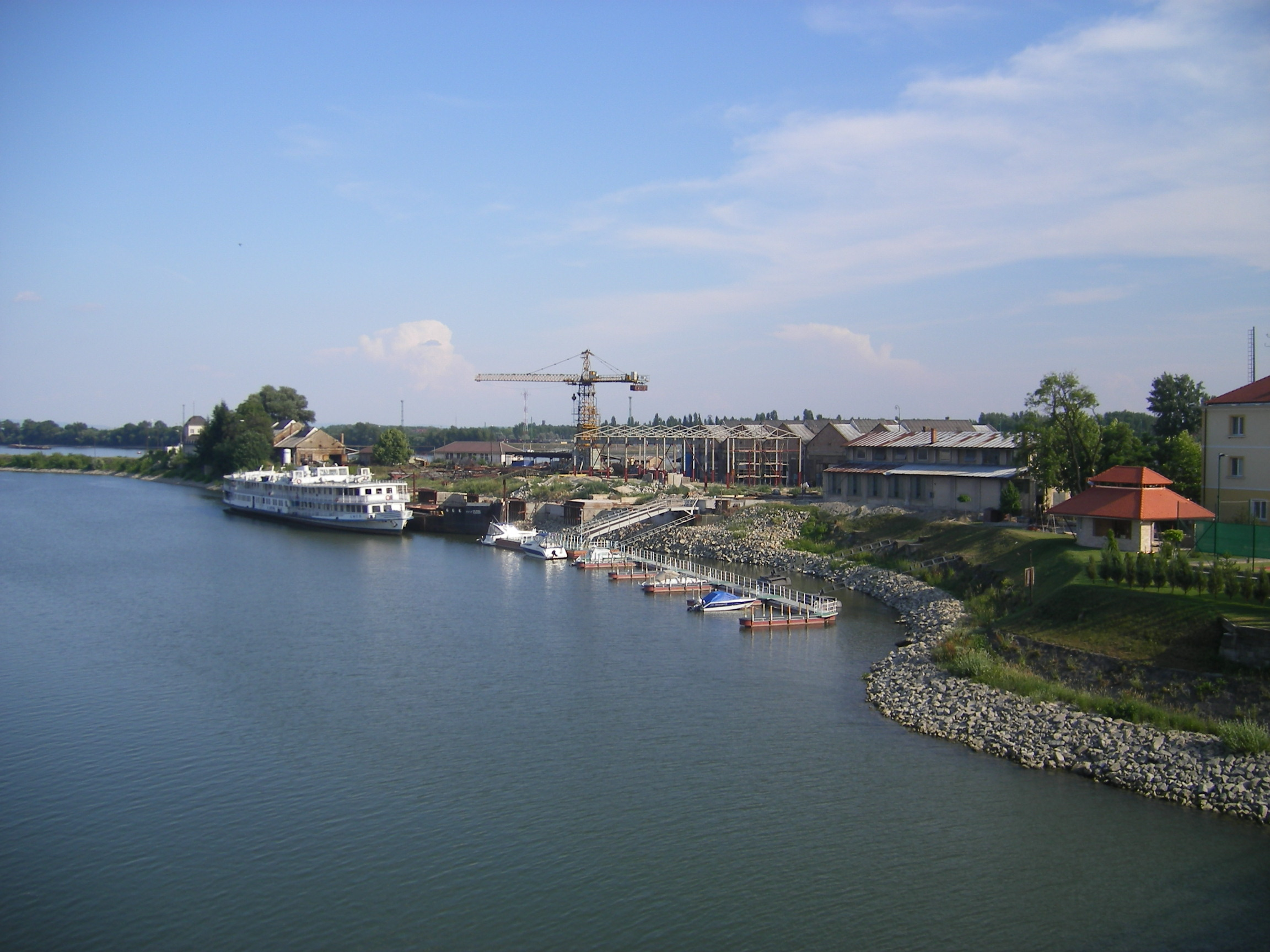 Komárom - Kis-Duna-ág és az Erzsébet-sziget keleti vége